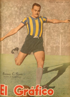 Benjamín Santos